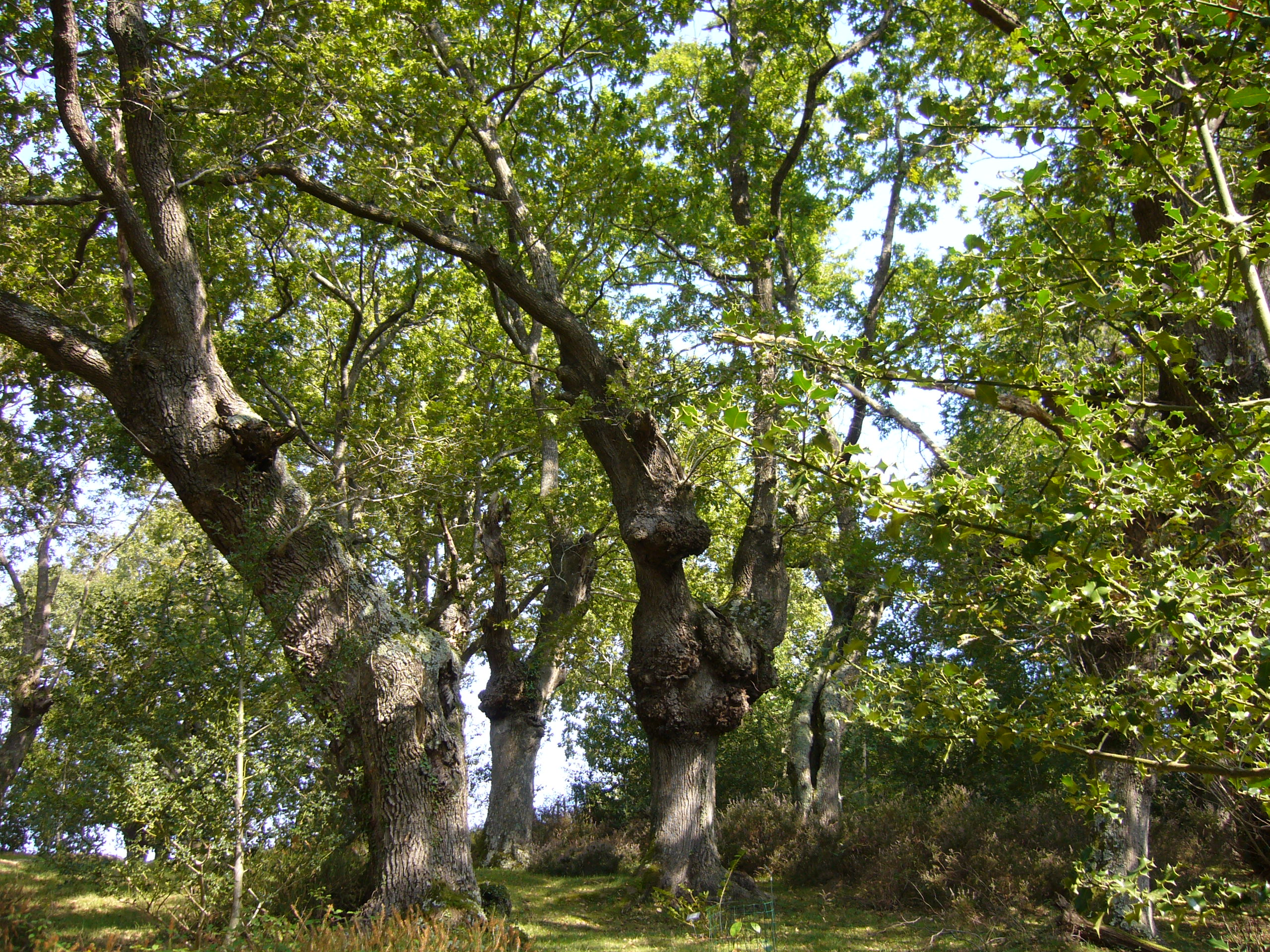 Harizti mugarrotu bat